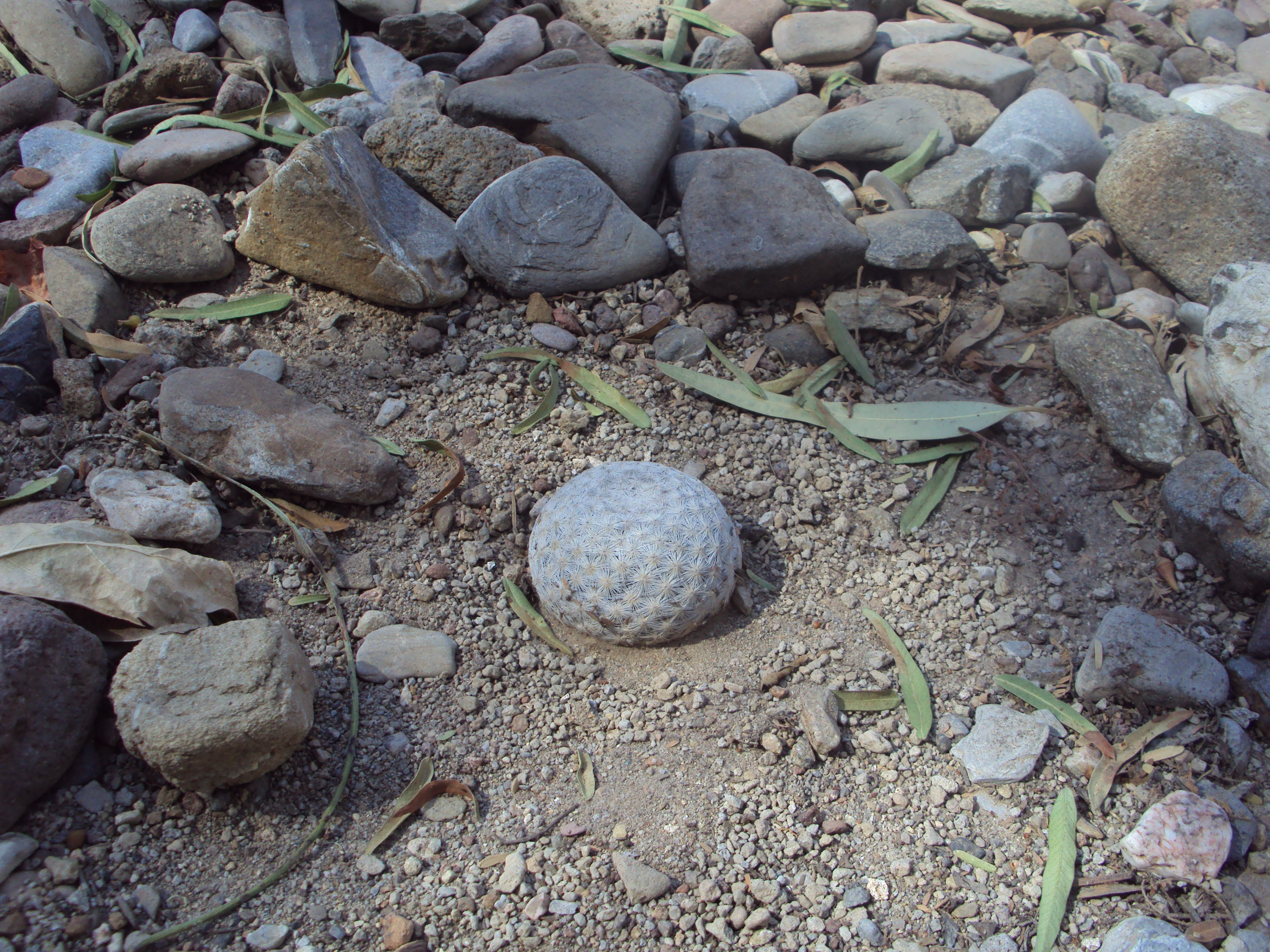 Mammillaria Herrerae, especie microendémica del edo. de Queretaro; foto tomada en el jardín botánico Regional "Ing Manuel Gonzáles de Cosío" de Cadereyta, Qro